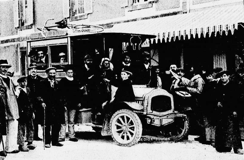 L'autobus de Dion-Bouton faisant le service entre Quimper, Bénodet, Fouesnant et Beg meil vers 1910 ( auteur anonyme, revue "La culture physique" du 15 juillet 1910)